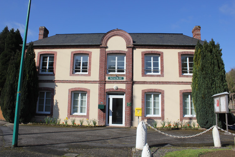 Mairie de la commune des Préaux